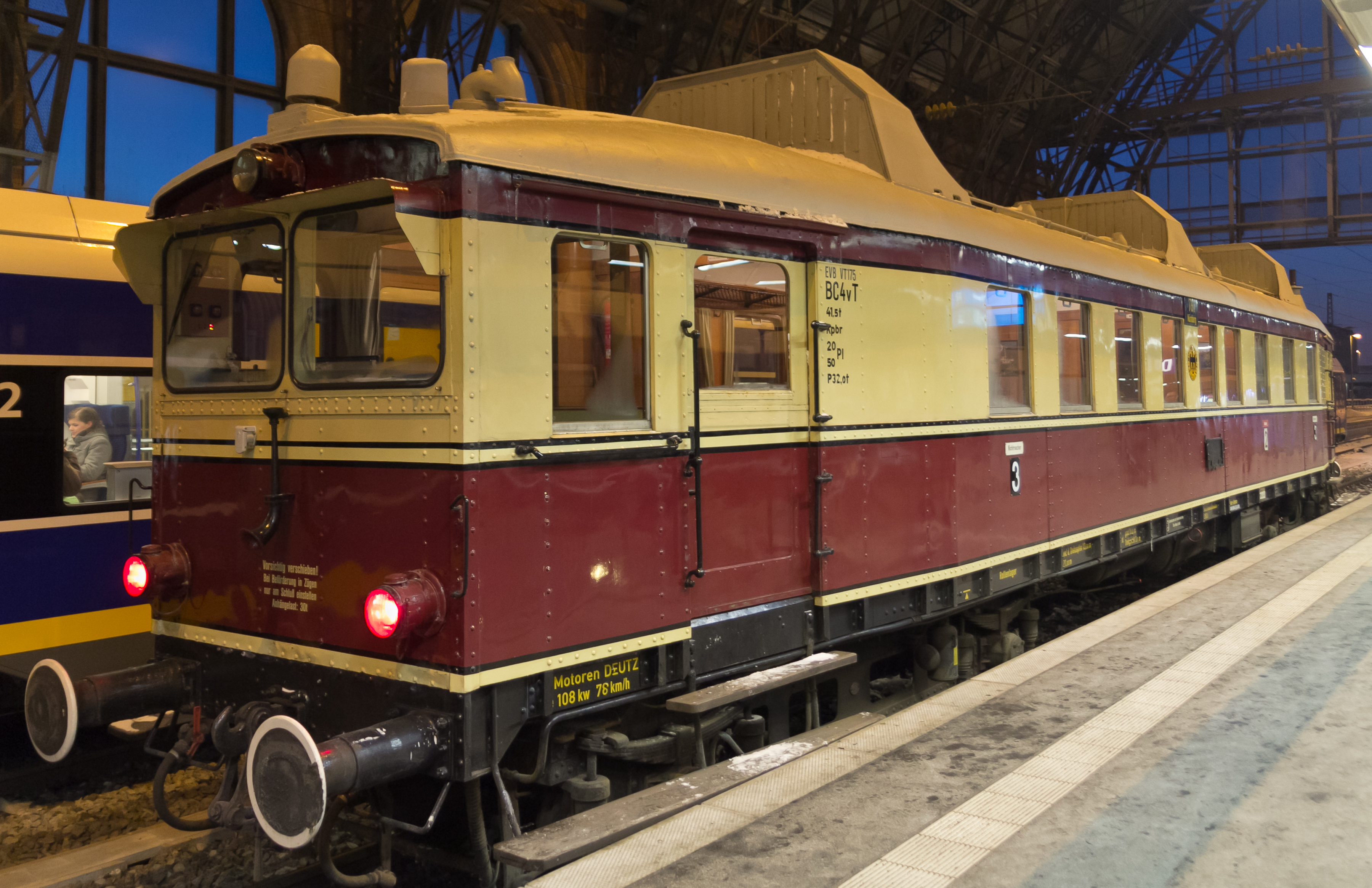 Dieseltriebwagen EVB VT 715 (ehem. Buxtehude-Harsefelder Eisenbahn)in Bremen Hbf.